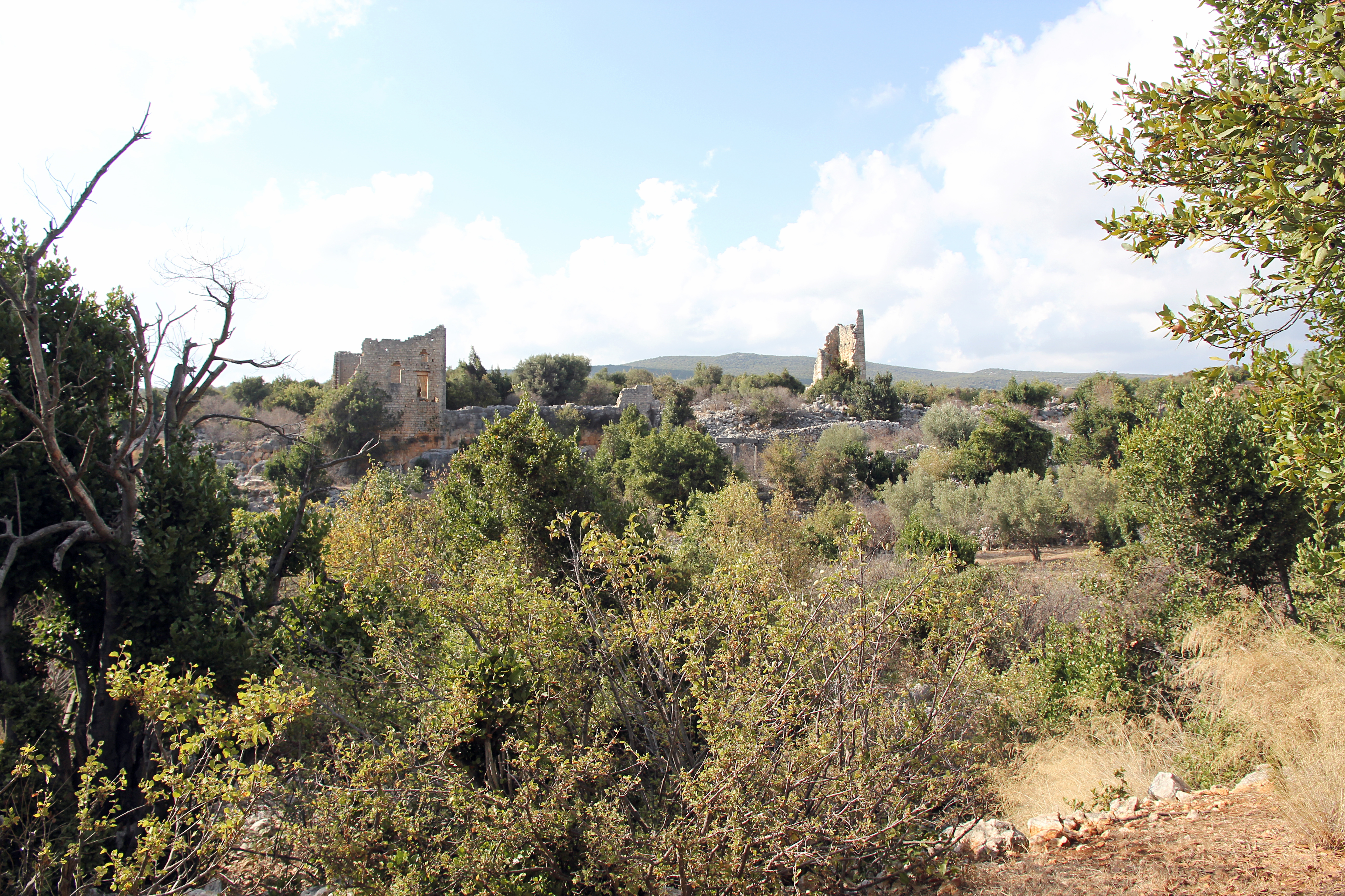 Emirzeli, byzantinische Kleinstadt im Rauhen Kilikien, Südtürkei, Ansicht des Haupthügels von Süden